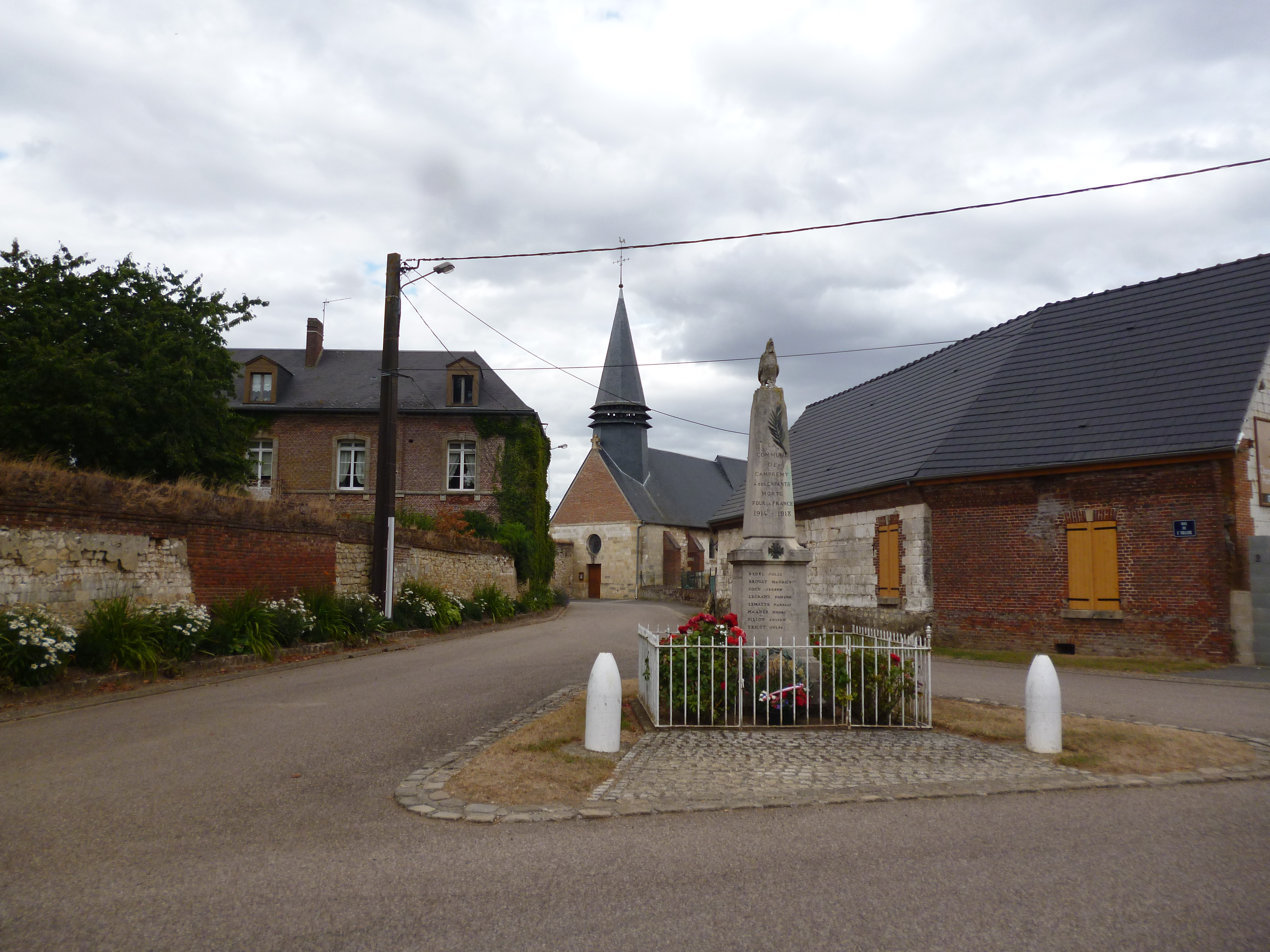 Monument aux morts de la commune de Campremy (Oise).